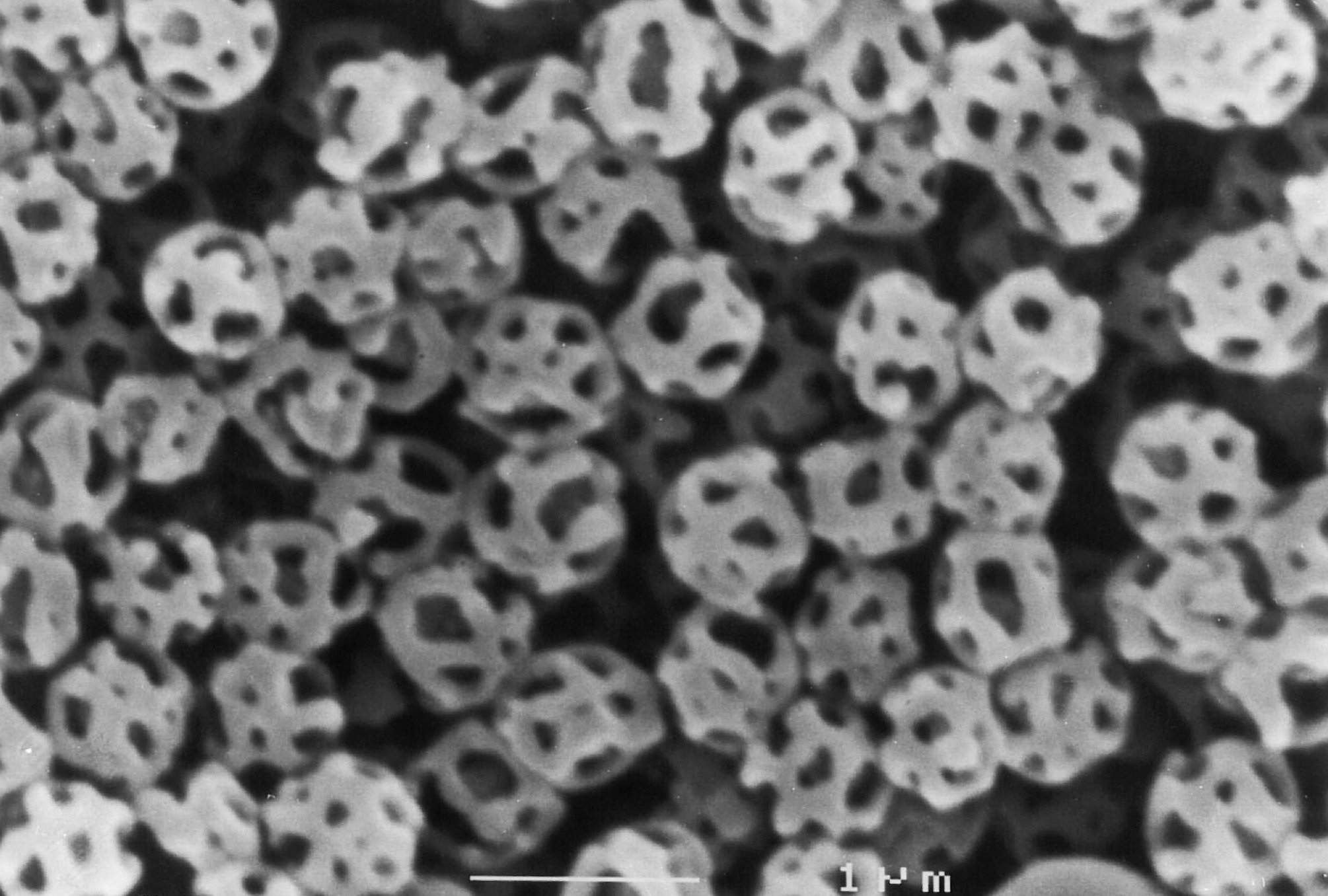 rasterelektronenmikroskopische Aufnahme eine Hohllatex mit unvollständiger Schale